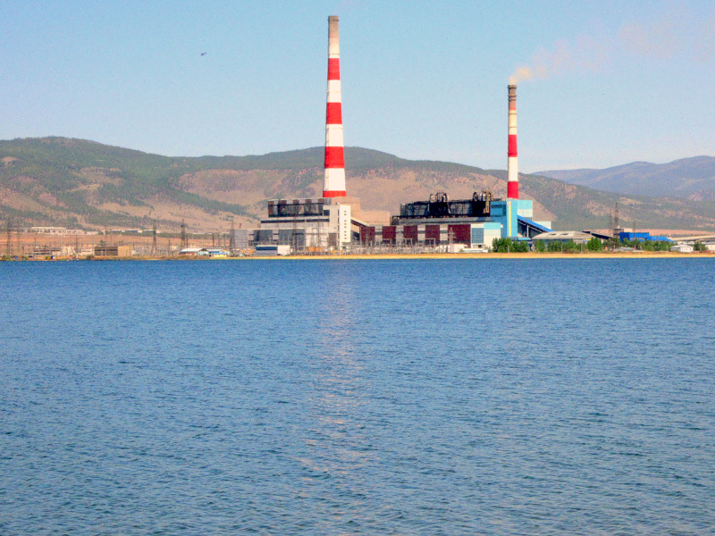 Гусиное озеро. ГРЭС.